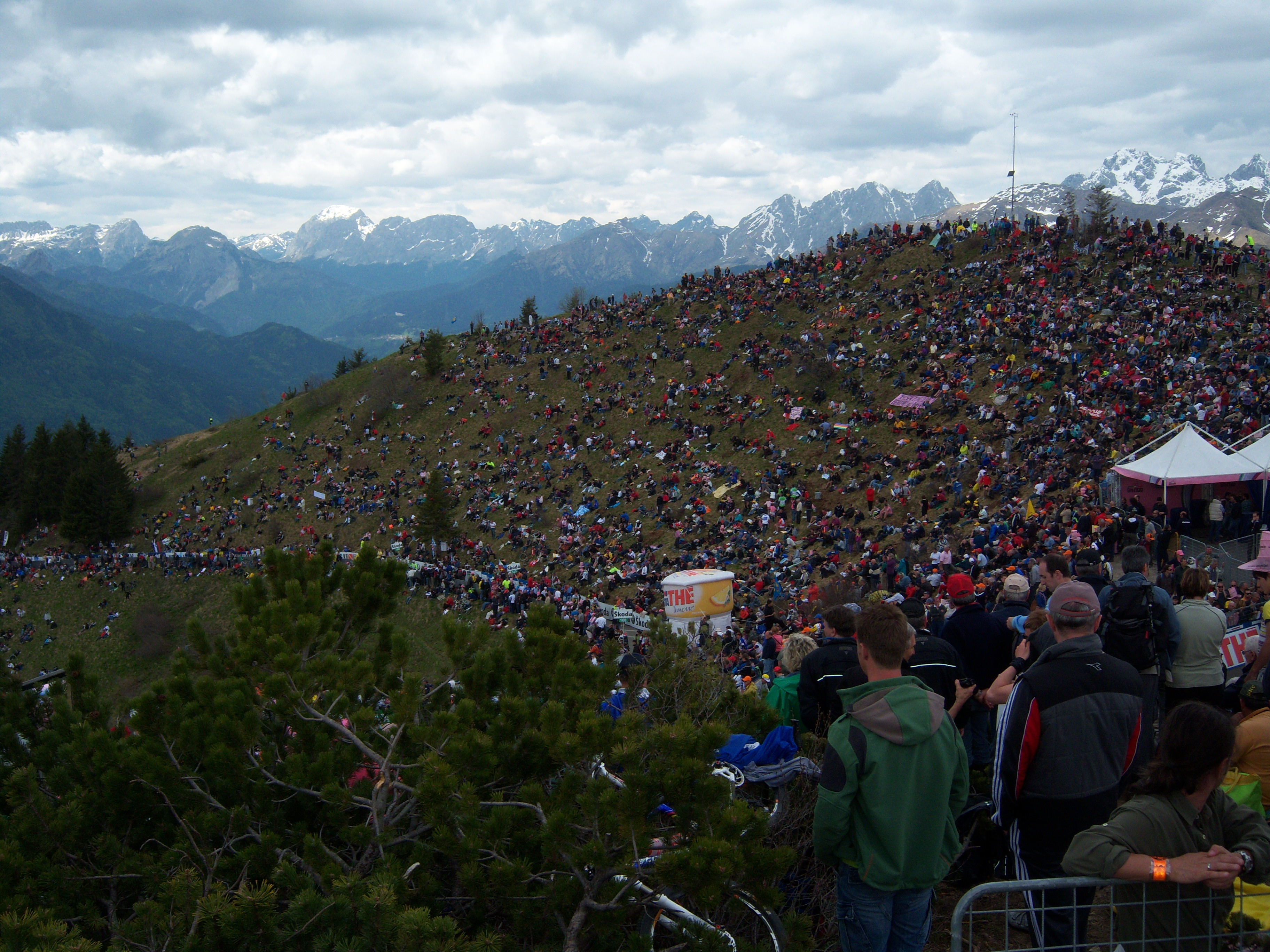 93esimo giro d Italia,la tappa del Zoncolan (View to Northwest)